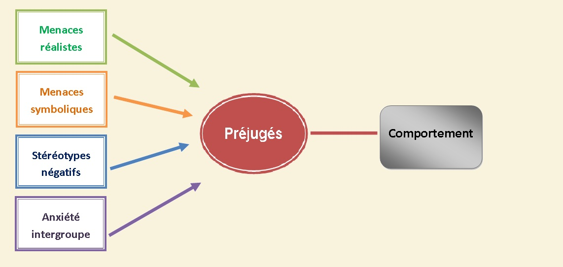 Modèle pour un travail en cours de psycho